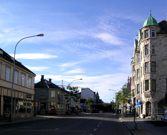 Søndre gate, Trondheim.